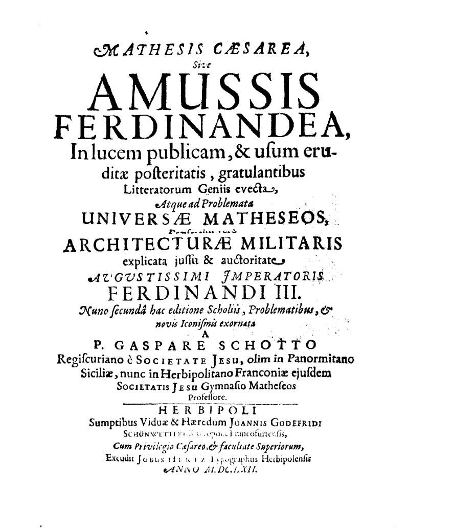 Mathesis caesarea, sive Amussis Ferdinandea, in lucem publicam, & usum eruditae posteritatis, gratulantibus litteratorum geniis evecta, atque ad problemata universae matheseos, praesertim vero architecturae militaris explicata jussu & auctoritate augustissimi imperatoris Ferdinandi 3.. - Herbipoli : sumptibus Viduae & haeredum Joannis Godefridi Schönwetteri bibliopolae Francofurtensis, … excudit Jobus Hertz typographus Herbipolensis, 1662. - [44], 464, [24] p., [14] c. di tav. calcografiche, [3] c. di tav. ripiegate calcografiche, [1] c. di tav. ripiegata : antiporta, ill. calcografiche ; 4º. - Tit. dell'occhietto: Mathesis caesarea, sive Amussis Ferdinandea, scholiis & iconismis aucta à P. Gaspare Schotto Societatis Jesu. - Autore dell'opera è Albert Curtz; cfr. VD17 23:000322 H. - Antiporta ed ill. firmate da Melchior Küssel .